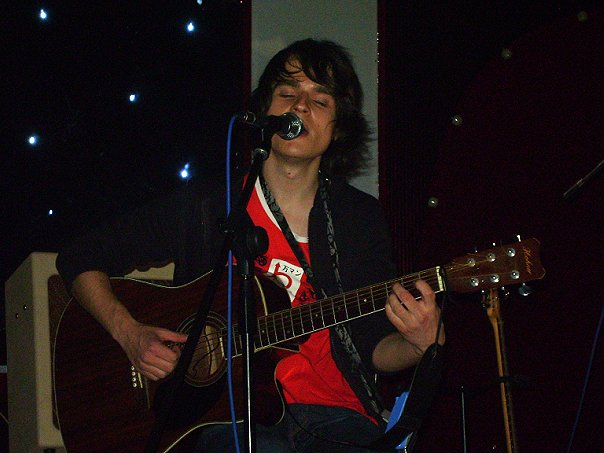 Сольний концерт гурту Julia Sleeps At the Kitchen, Кривий Ріг, 2009 рік.